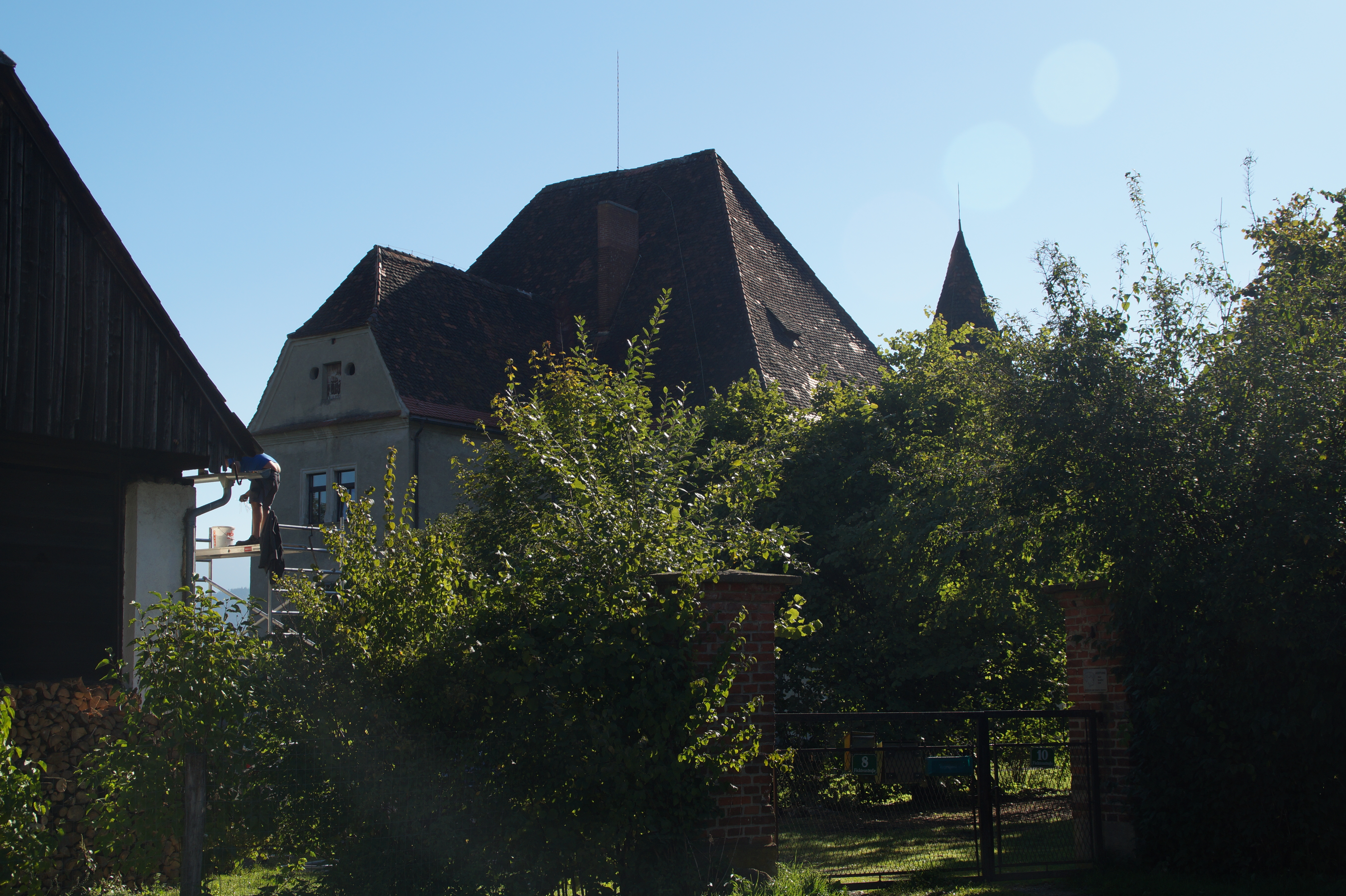 Schloss Hautzenbichl, Kobenz, Bezirk Murtal